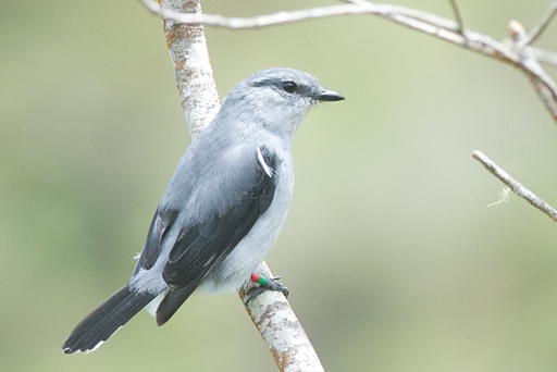 Echenilleur de la Réunion (Coracina newtoni) mâle adulte.